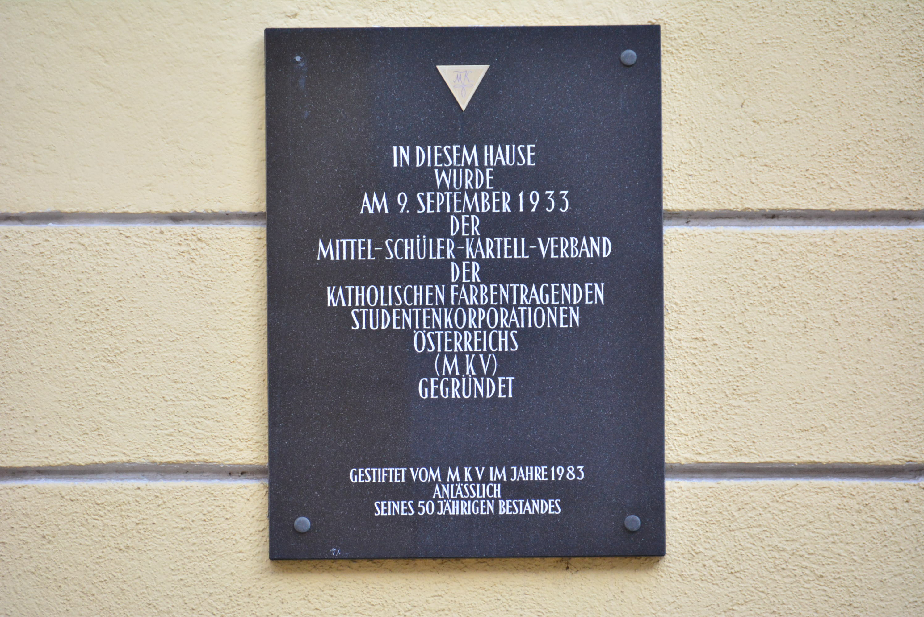 Gedenktafel für die Gründung des MKV (Wien, Döblinger Hauptstraße 76)